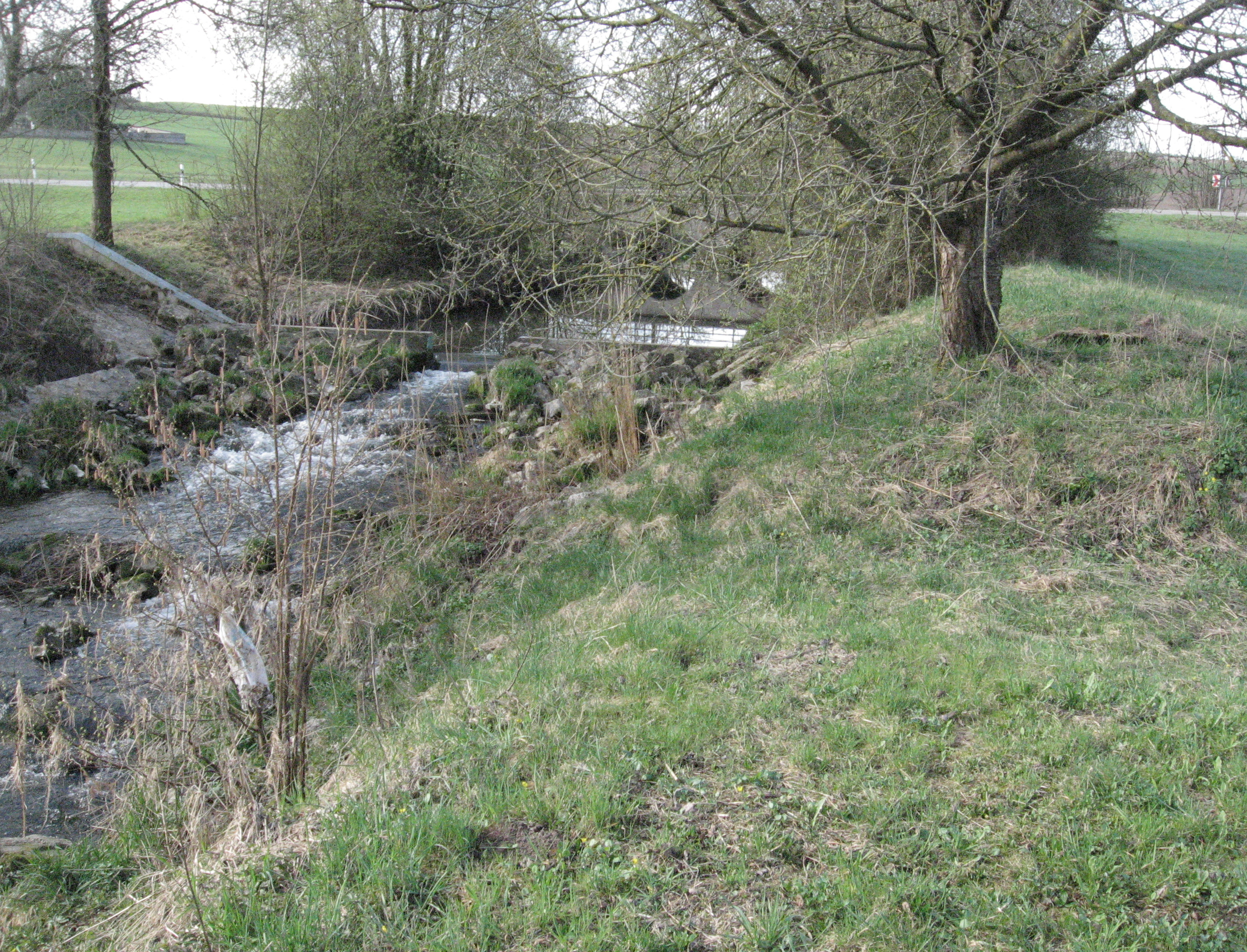 Querbauwerk in der Fischach zwischen der L 1072 (im Hintergrund) und ihrer Mündung in die Bühler bei Bühlertann-Kottspiel. Die Geländescharte in der rechten Bildmitte führt zu einem Wiesengraben in der Bühleraue, der bei starkem Hochwasser einen Teil der Wassermassen auf direktem Wege zur Bühlertanner Weidenmühle leitet.